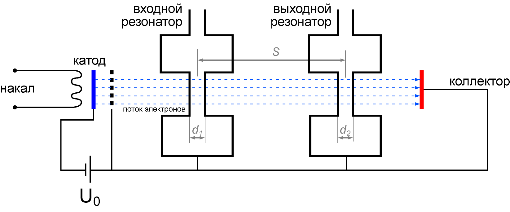 Схема пролётного клистрона